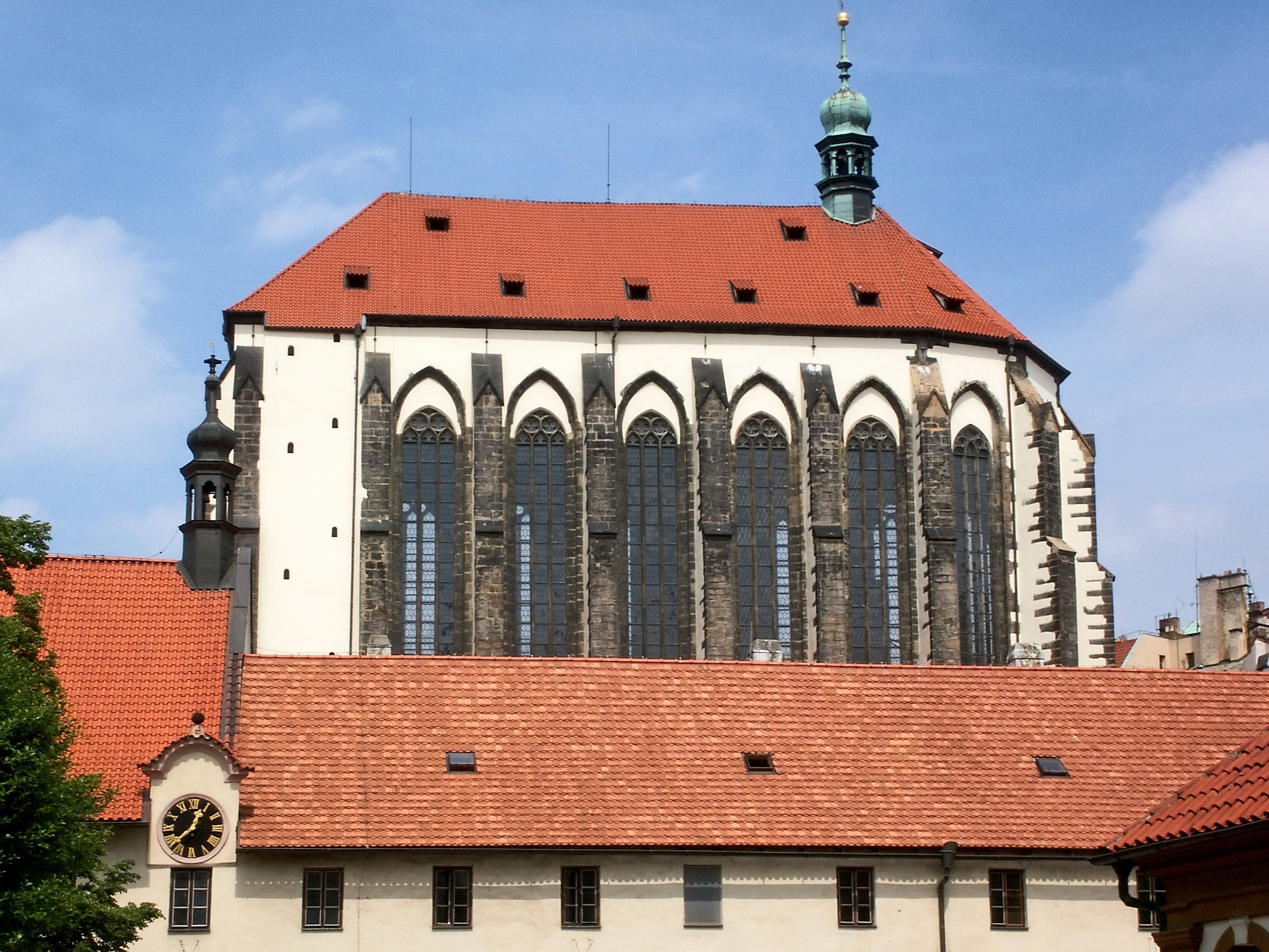 Pohled na kostel Panny Marie Sněžné z Františkánské zahrady